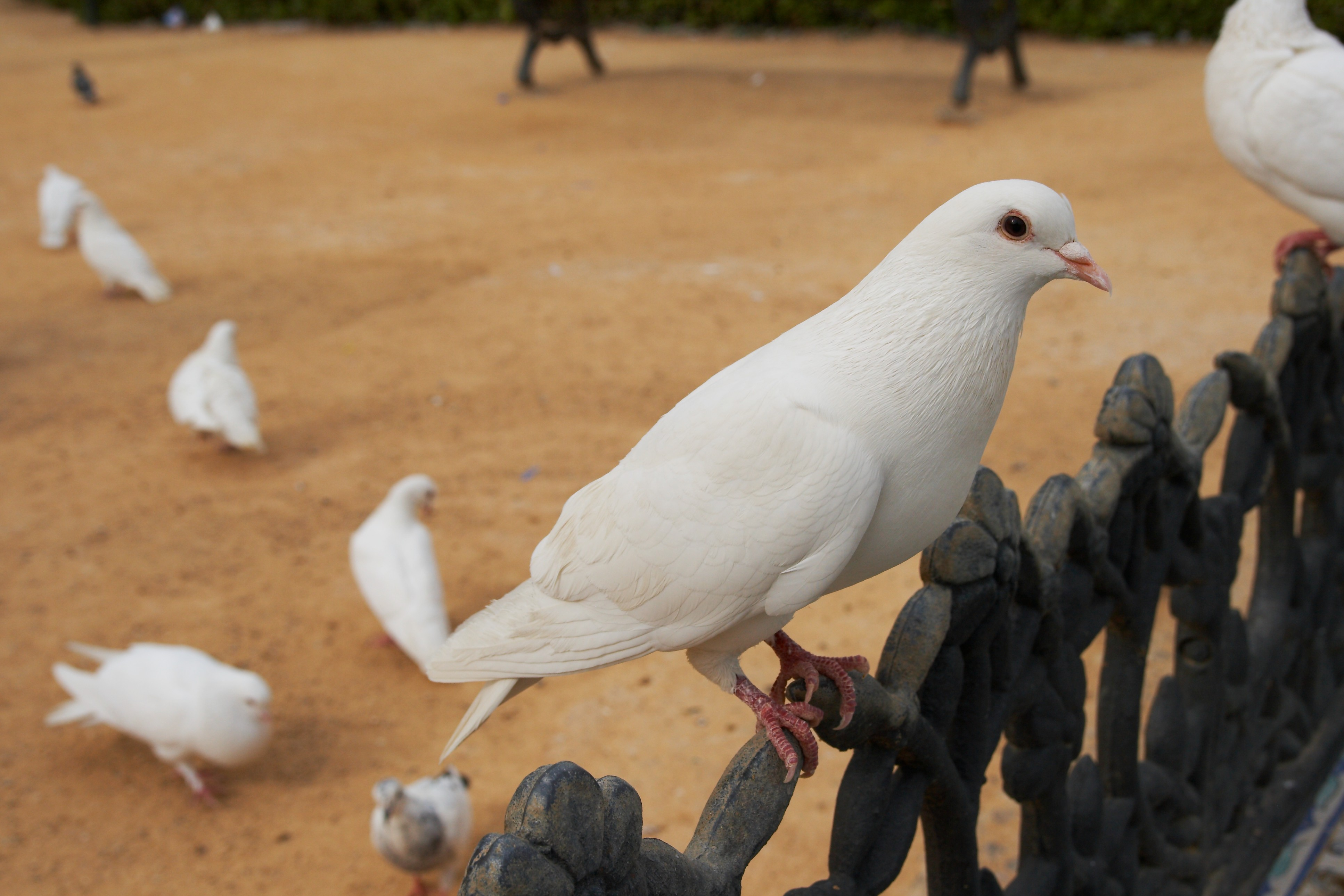 Paloma. Plaza de América, Sevilla, España.